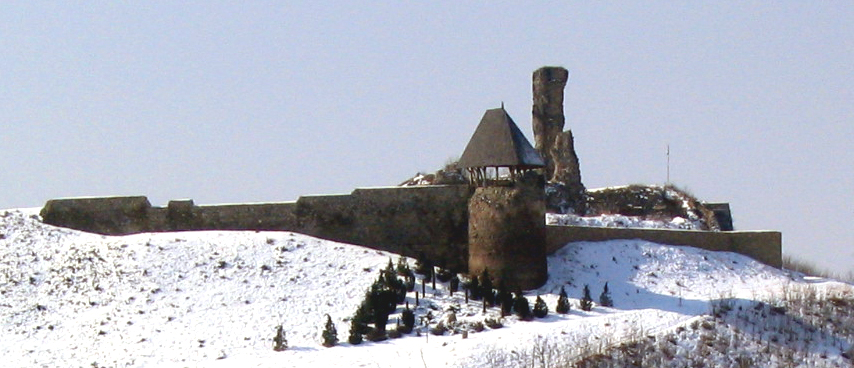 A nógrádi vár